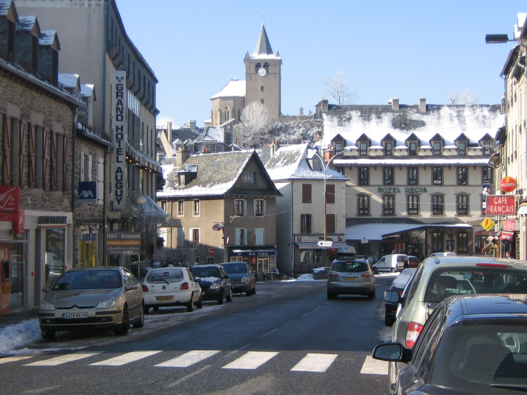 Une rue de Laguiole (Aveyron, Midi-Pyrénées, France).